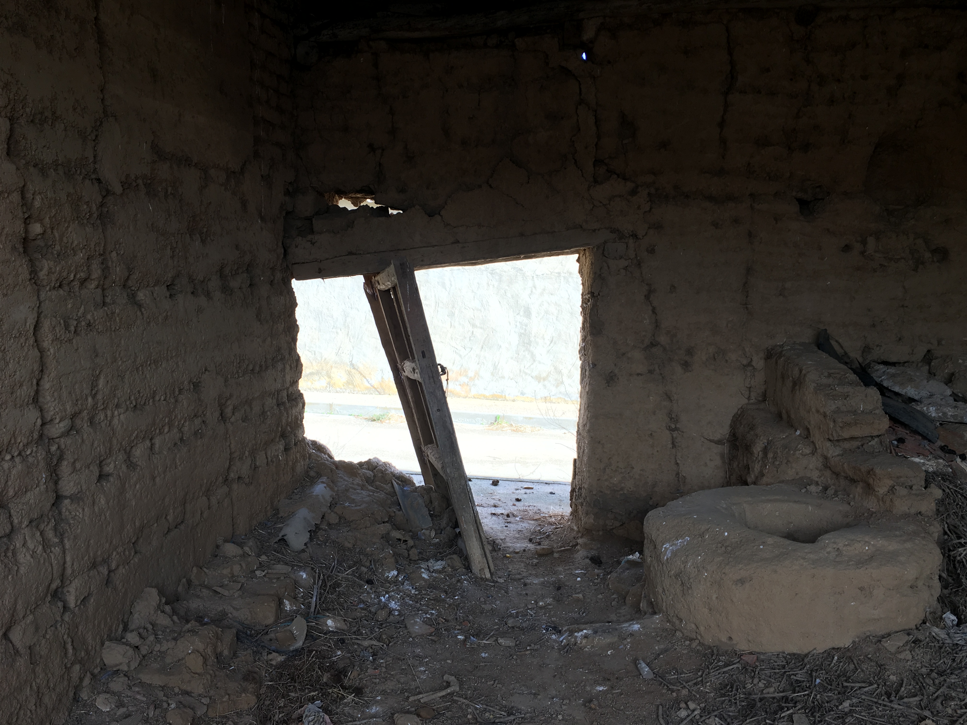 Villaesper Milenario